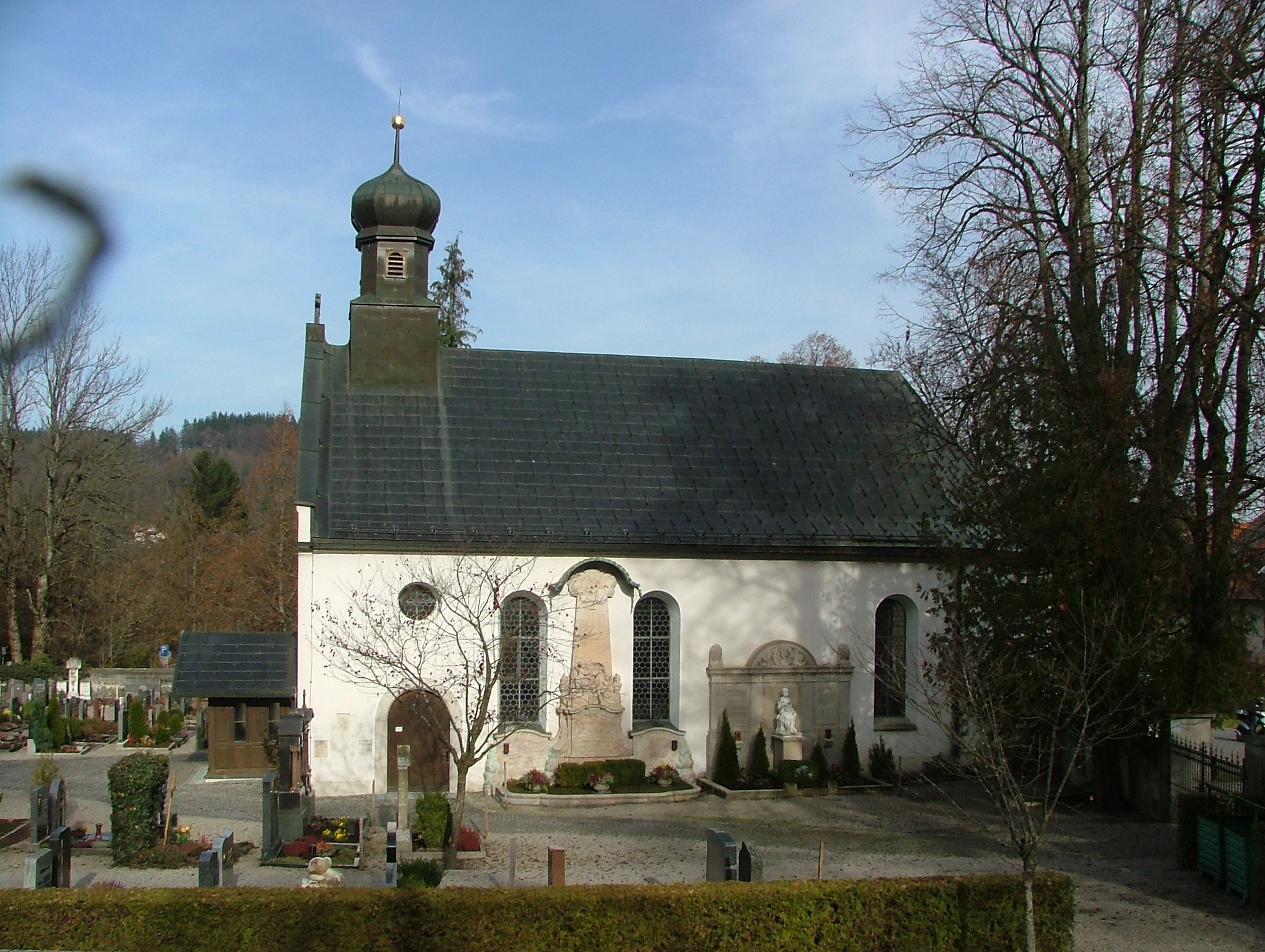 Friedhofskapelle